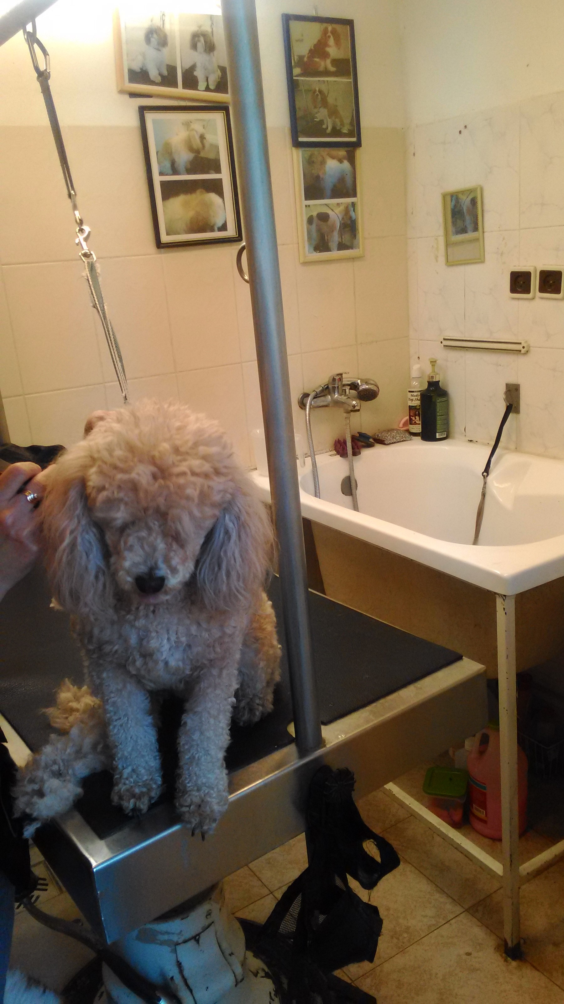 כלבת פודל בעת תספורת